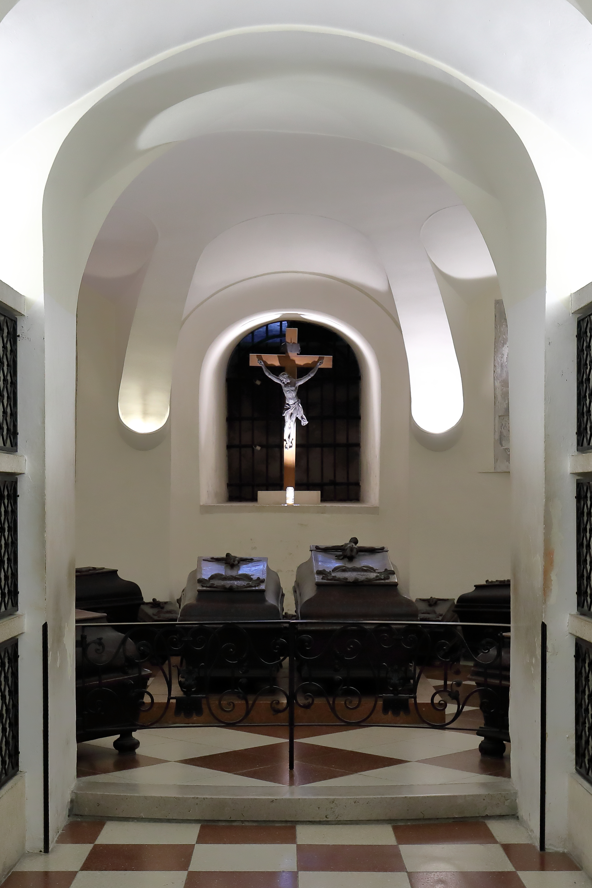 Die Herzogsgruft unter dem Mittelchor des Stephansdoms in der österreichischen Bundeshauptstadt Wien. In ihr sind der Stifter des Stephansdoms, Herzog Rudolf IV., seine Gattin und über 10 weitere Familienmitglieder beigesetzt.